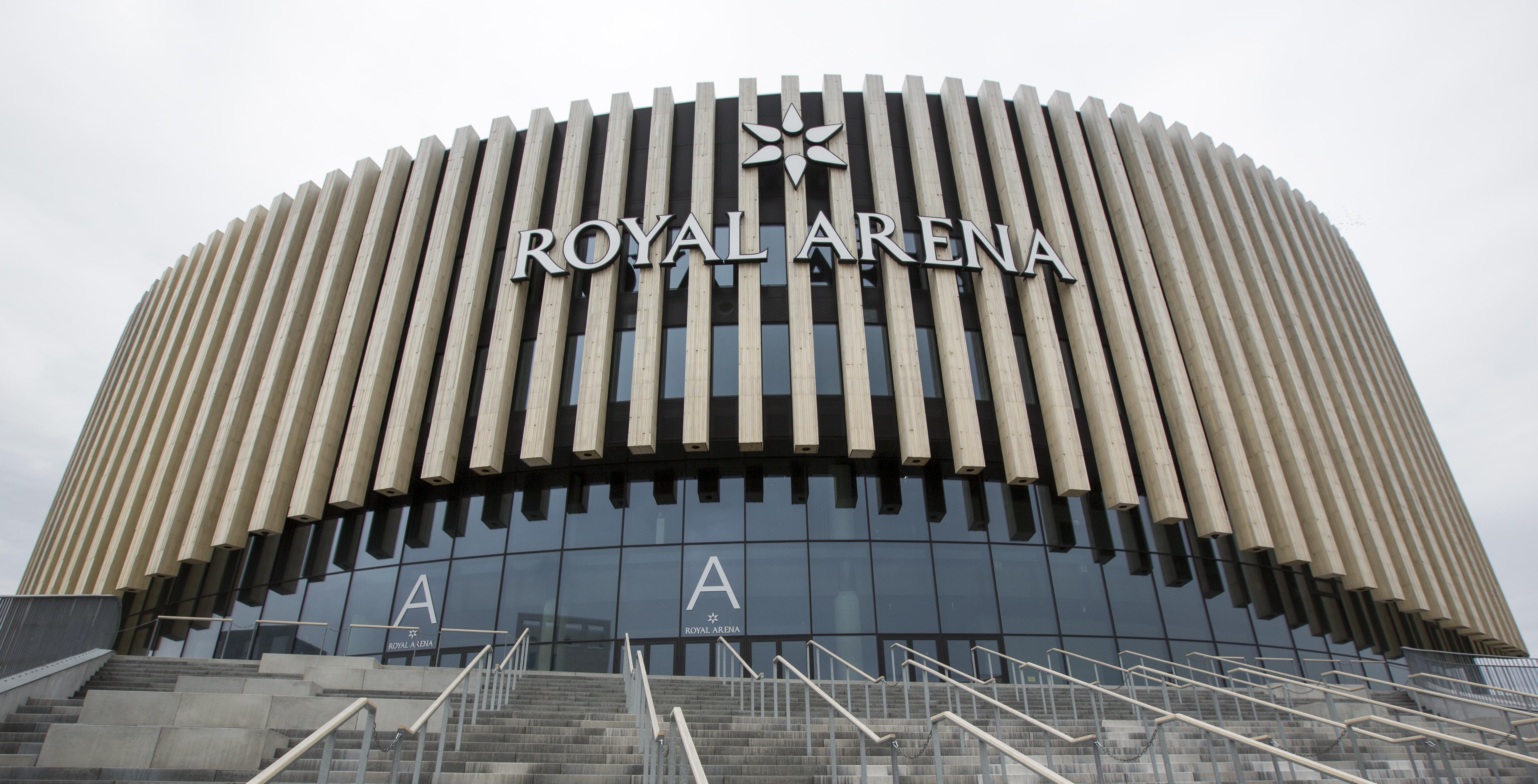 Multiarenanan Royal Arena i Ørestad, 2017-08-11. Photo: News Øresund - Jenny Andersson. © News Øresund - Jenny Andersson (CC BY 3.0). Detta verk av News Øresund är licensierat under en Creative Commons Erkännande 3.0 Unported-licens (CC BY 3.0). Bilden får fritt publiceras under förutsättning att källa anges. .The picture can be used freely under the prerequisite that the source is given. News Øresund, Malmö, Sweden.News Øresund är en oberoende regional nyhetsbyrå som är en del av det oberoende dansk-svenska kunskapscentrat Øresundsinstituttet.